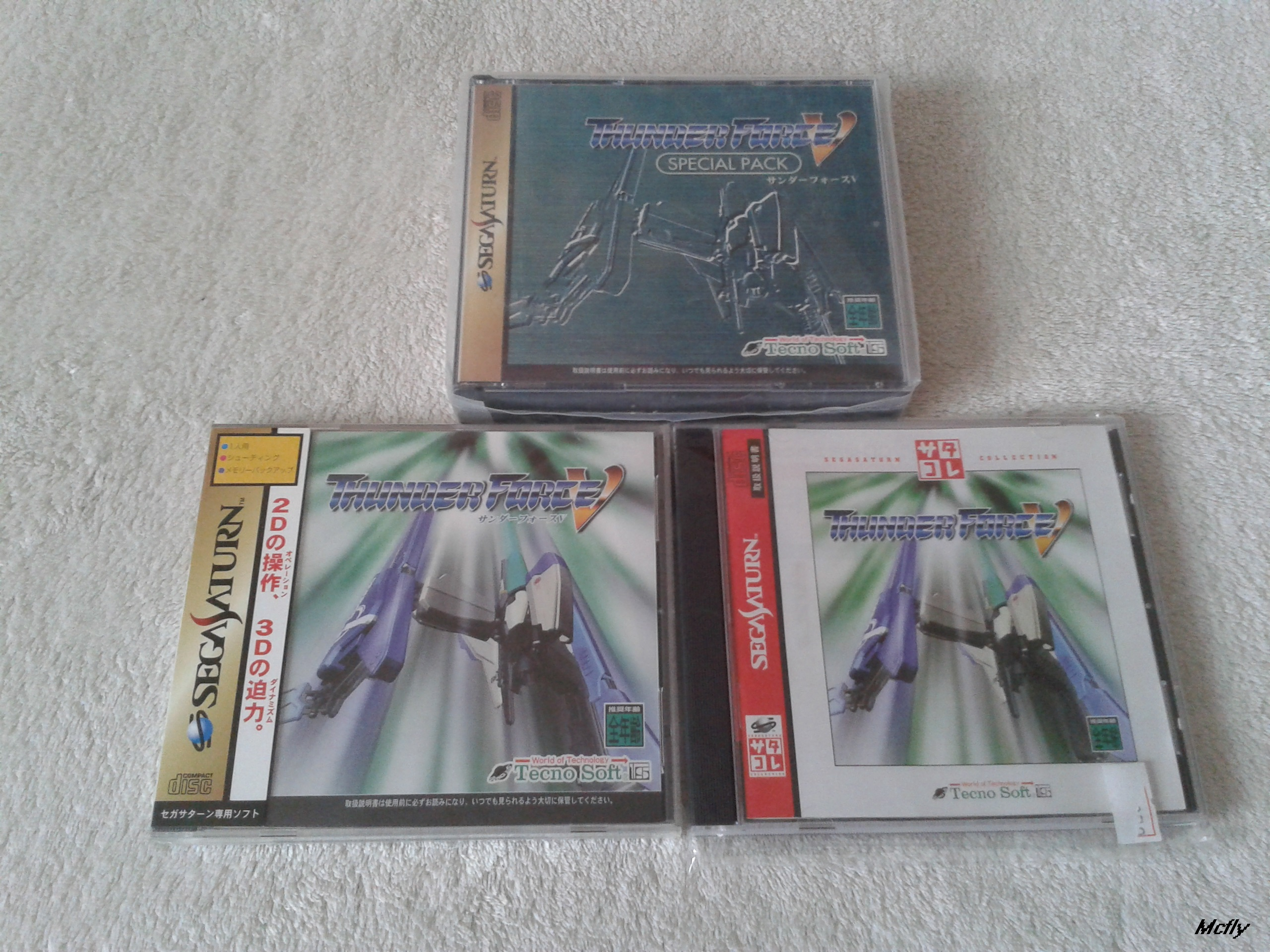 tf5 sega saturn